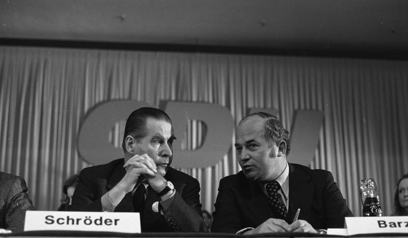 Großkundgebung der CDU zur Bundestagswahl in Köln, Messehalle (links: Gerhard Schröder, rechts: Rainer Barzel)